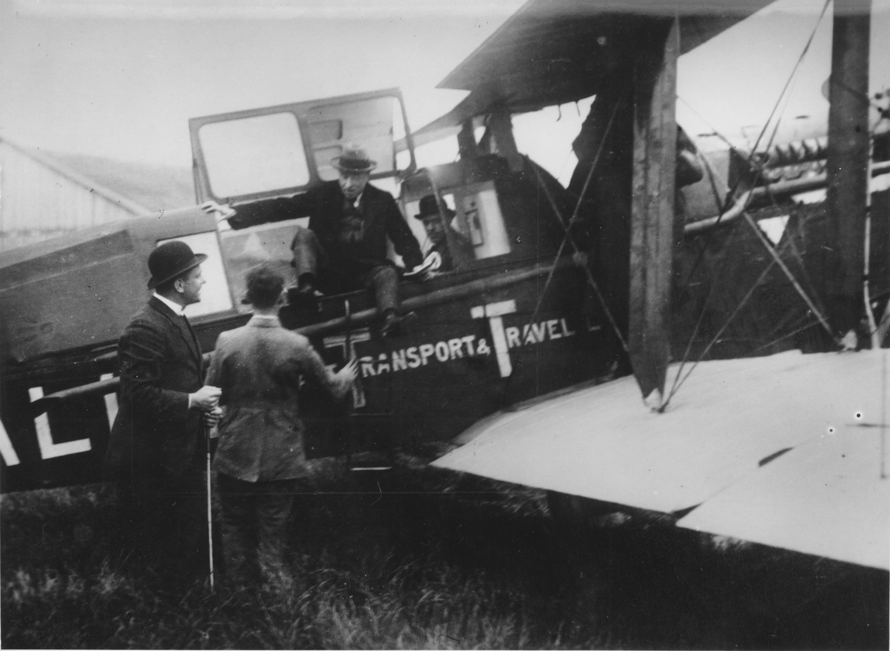 Aankomst van de eerste KLM vlucht uit Londen op Schiphol. De passagiers en piloot Jerry Shaw worden verwelkomd door Dr. Albert Plesman (links met bolhoed), oprichter en eerste president-directeur van de KLM, Schiphol, Nederland 17 mei 1920.